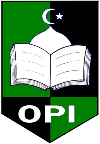 Lambang Organisasi Pelajar Islam OPI